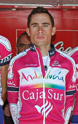 Claudio José Casas. Andalucía-Cajasur, Euskal Bizikleta 2008